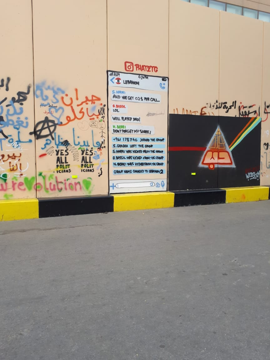 Graffiti bei den Protesten in Beirut. Der Tetxt lautet sinnegmäß: eine Chatgruppe; Hariri schreibt: Wir bekommen 20 Cent pro Anruf. Der Außenminister Gebran Bassil sagt: Lol. Gut gemacht, Bruder. Der Parlamentspräsident Berri sagt: Vergesst nicht meinen Anteil! Ein Unbekannter trott der Gruupe bei; Samir Geagea verlässt die Gruppe; Hariri, Bassil und Berri werden von der Gruppe ausgeschlossen. Der Gruppenname wird darauf geändert in Lebanon Two, was bedeutet: Wir beginnen mit einem zweiten Libanon.